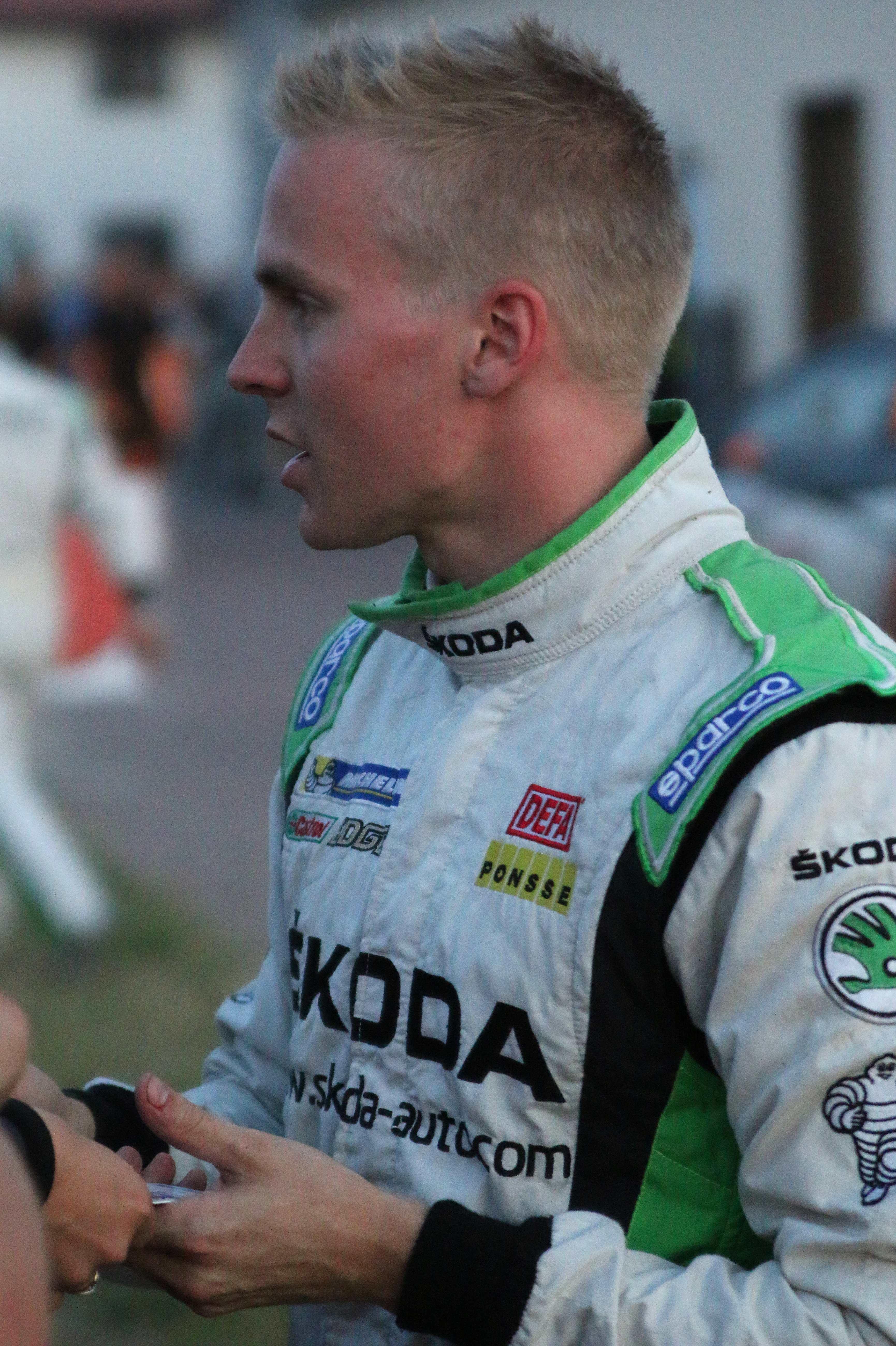 Esapekka Lappi